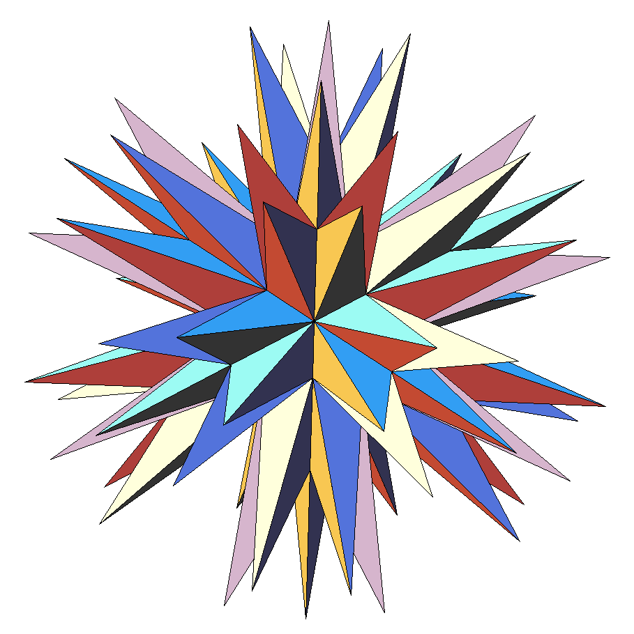 Семнадцатая звёздчатая форма икосаэдра.